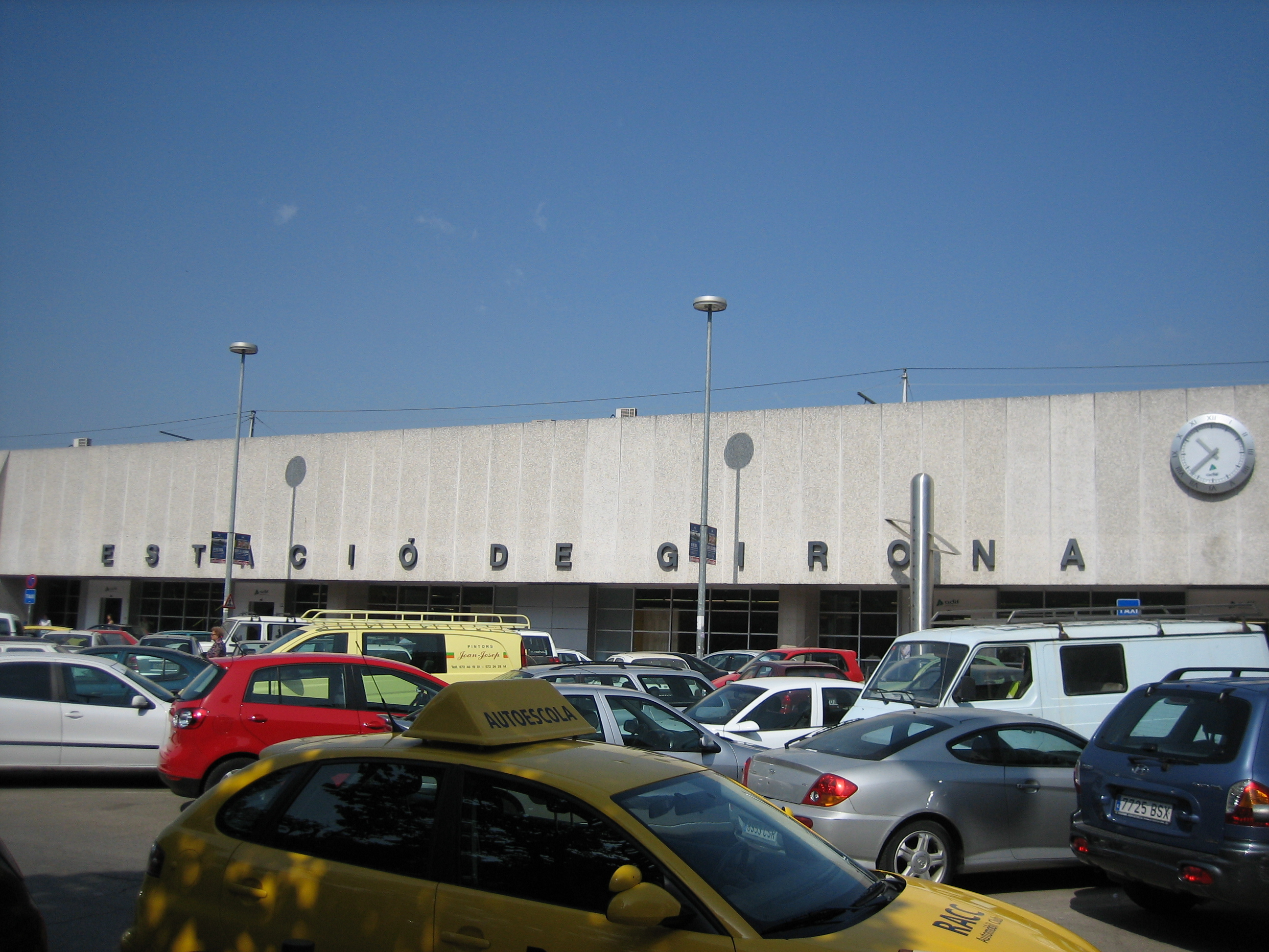 Estació del ferrocariil de Girona